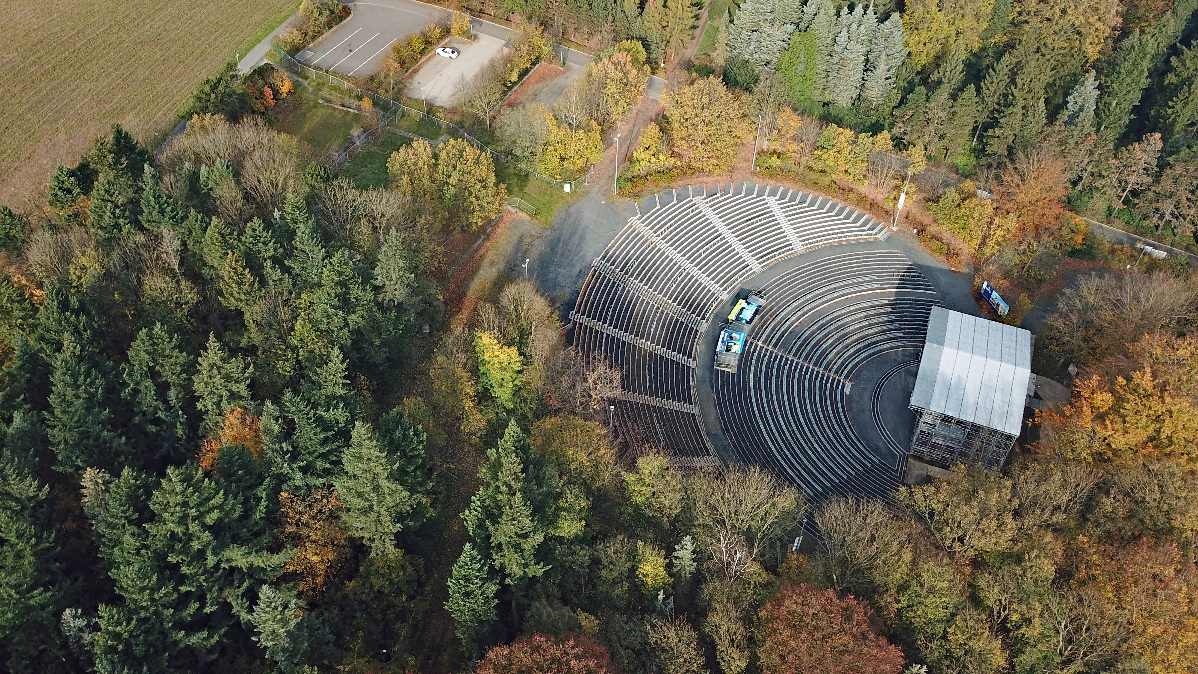 Kamenz, Hutbergbühne (ehemaliger Thingplatz), Luftbild